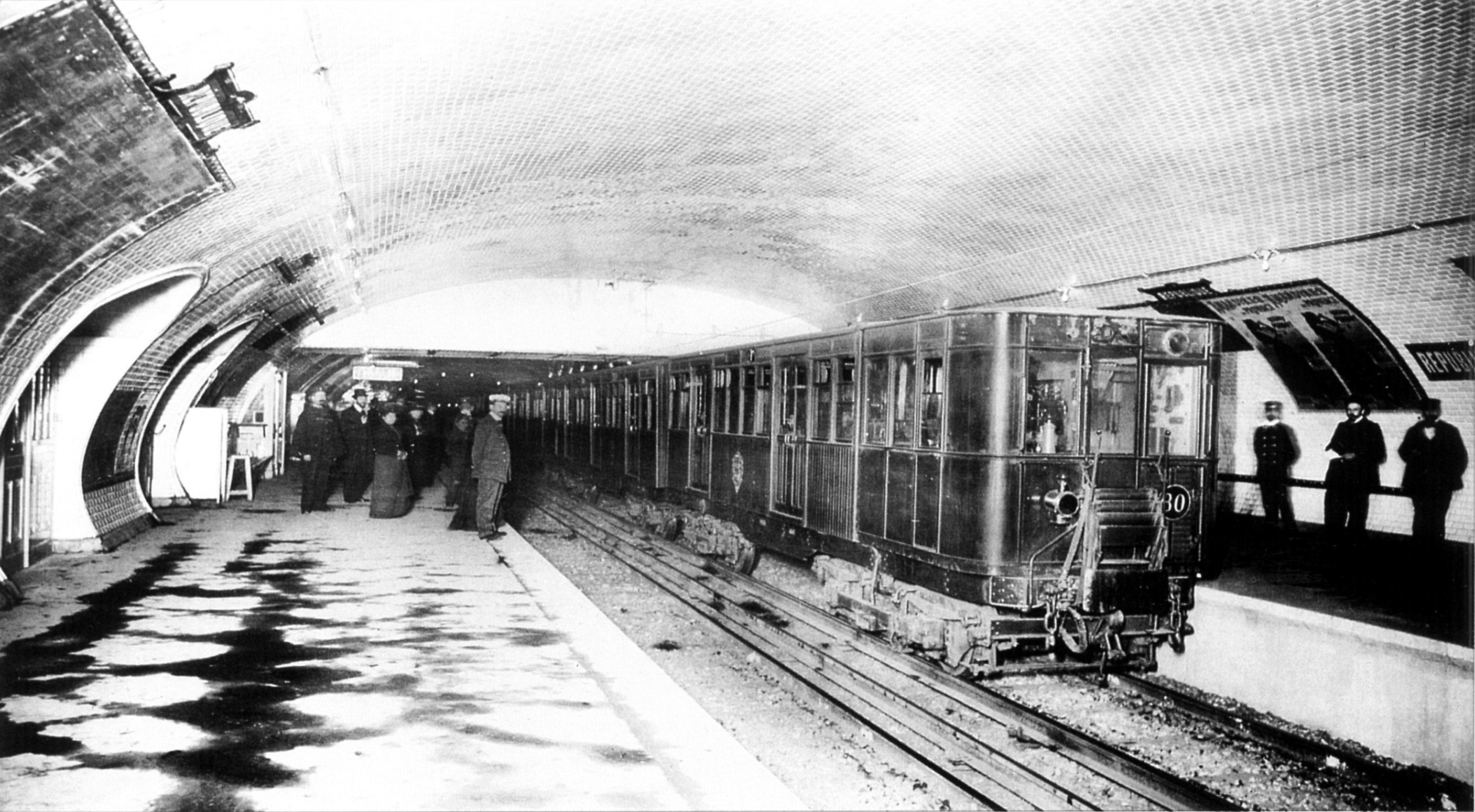 Photo d'une rame à la station République de la ligne 3 du métro de Paris, France.